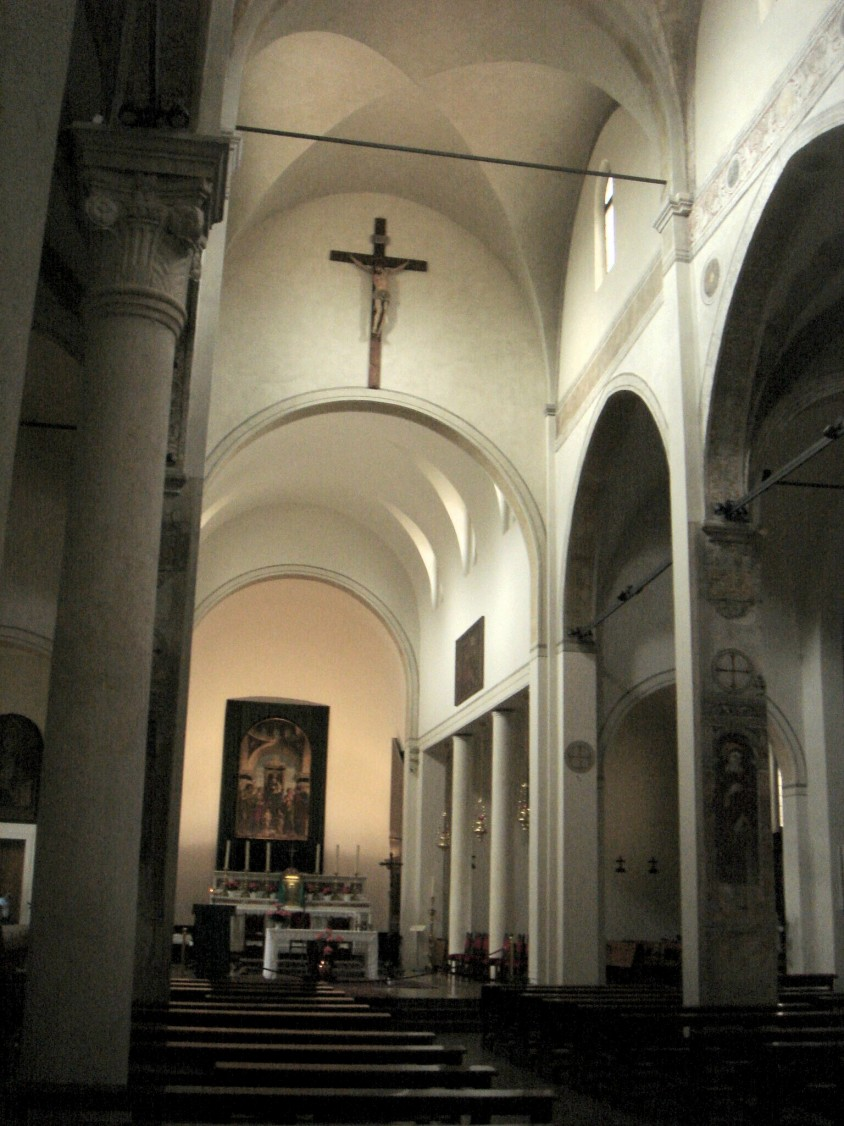 Conegliano: interno del Duomo, navata centrale culminante nella Pala del Cima.